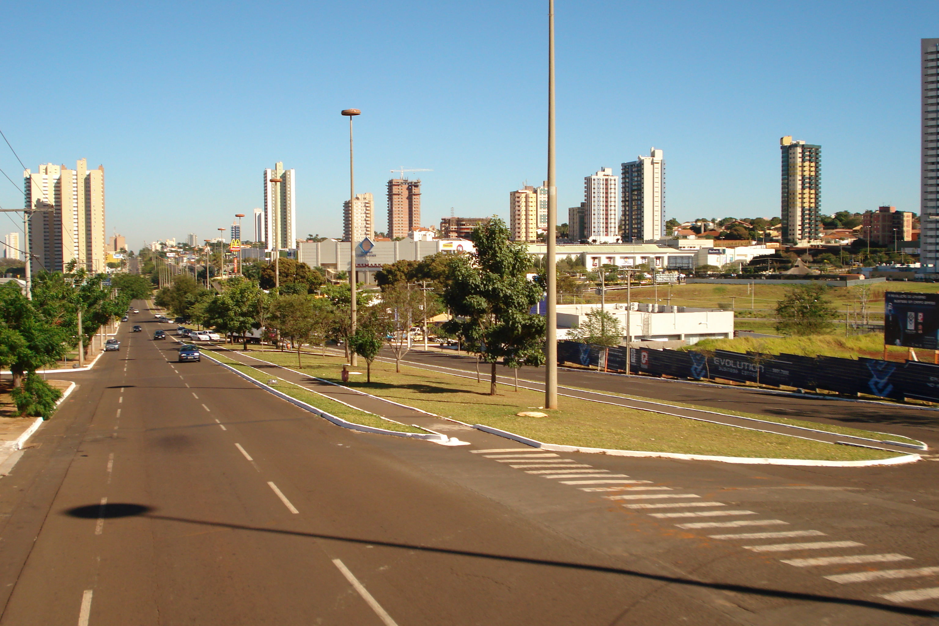 Afonso Pena Avenue